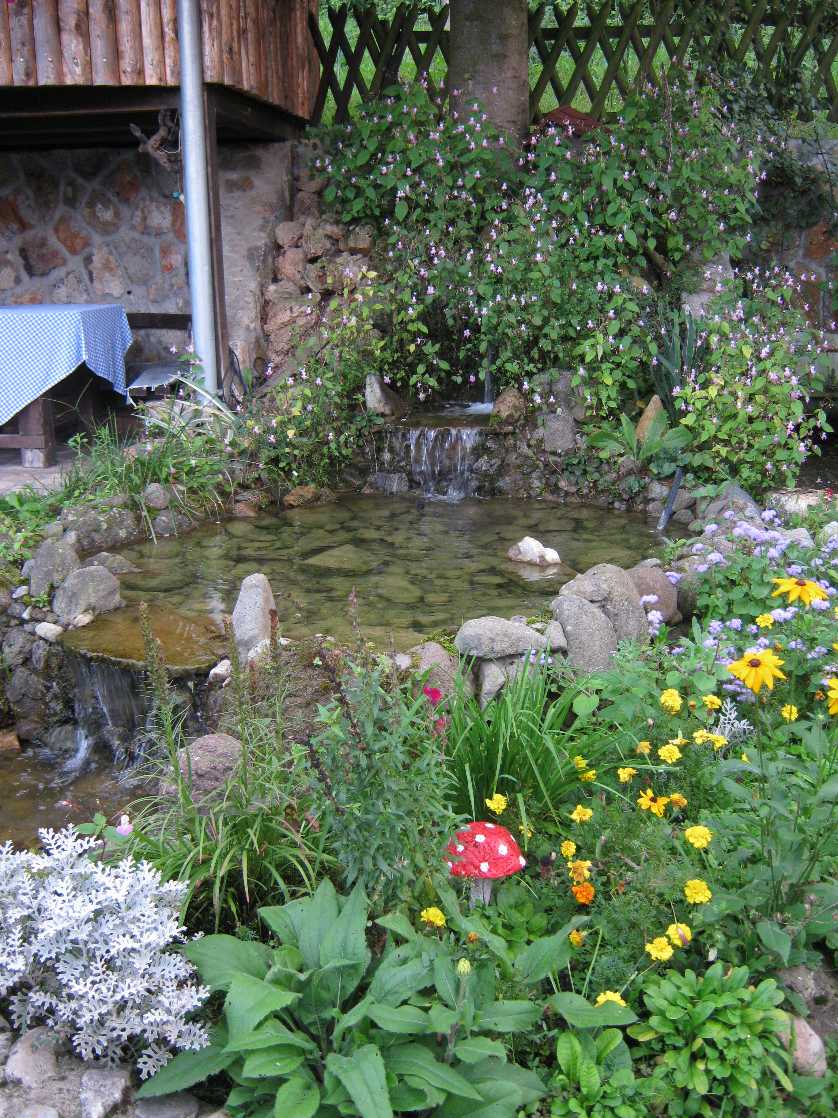 Етно парк Терзића авлија, као сеоско туристичко домаћинство, из околине Ужица, у селу Злакуса (185 km од Београда) представља једну врсту музеја на отвореном и затвореном. У близини се налази Потпећка пећина тако да је савршено место за излет и увид у прелепу историју села, културе и природних лепота Србије.